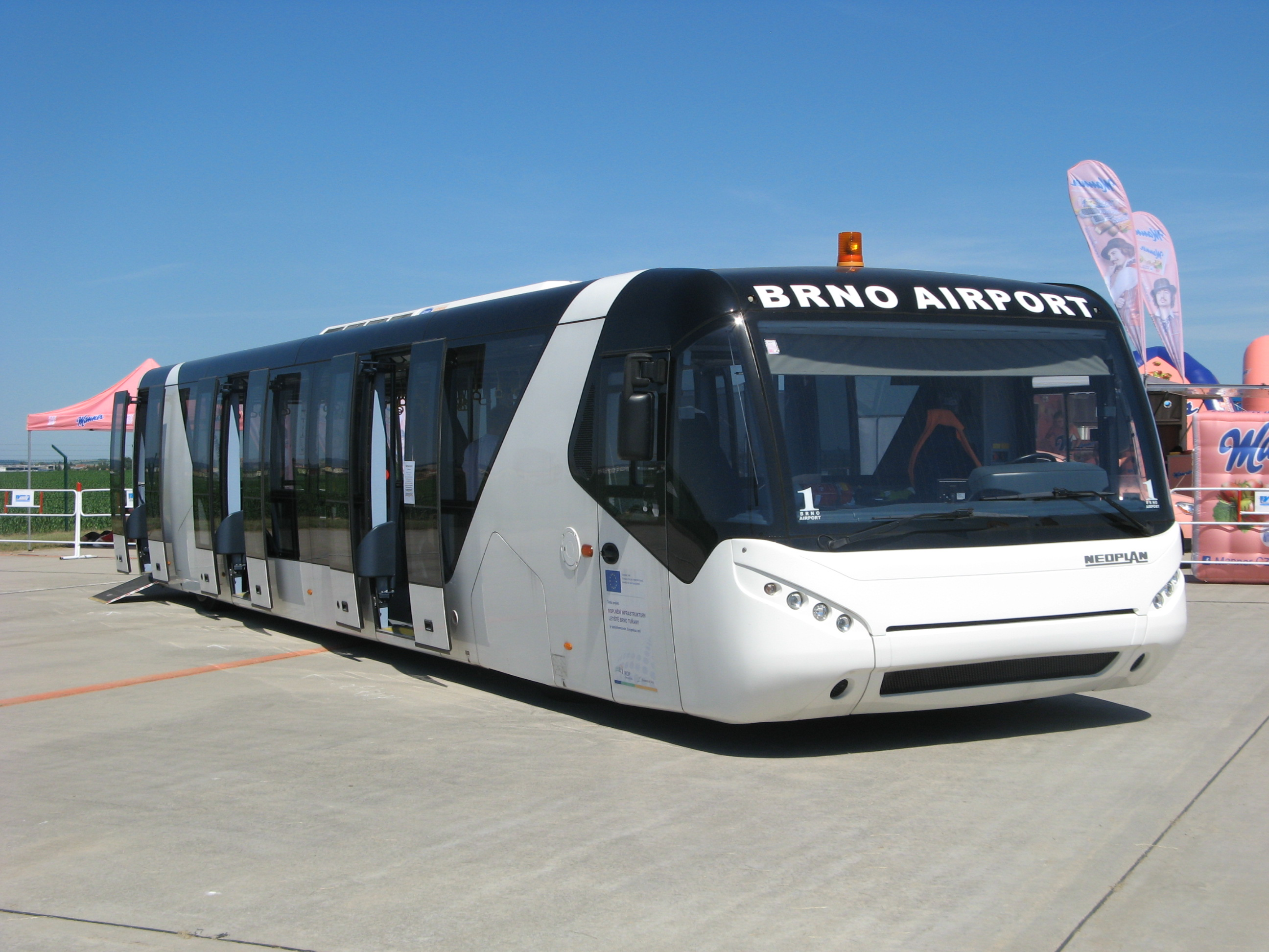 Neoplan N 9122 L (Brno-Tuřany Airport), Czech republic